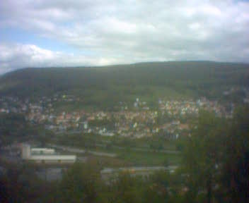 Blick von der Burg auf Kulmbach. Beispiel für ein MMS-Bild; Handymodell: Sony-Ericsson T610